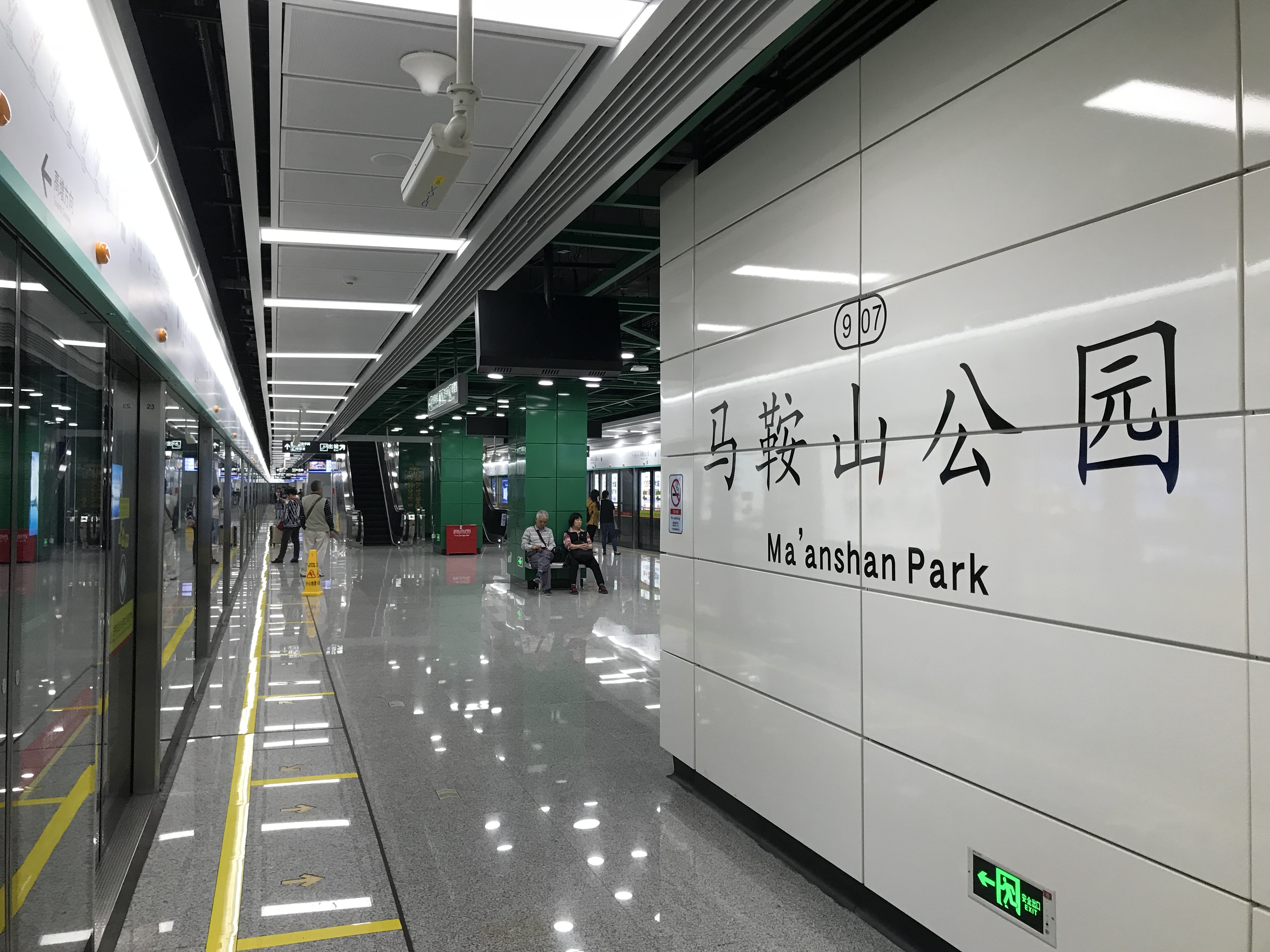 广州地铁马鞍山公园站